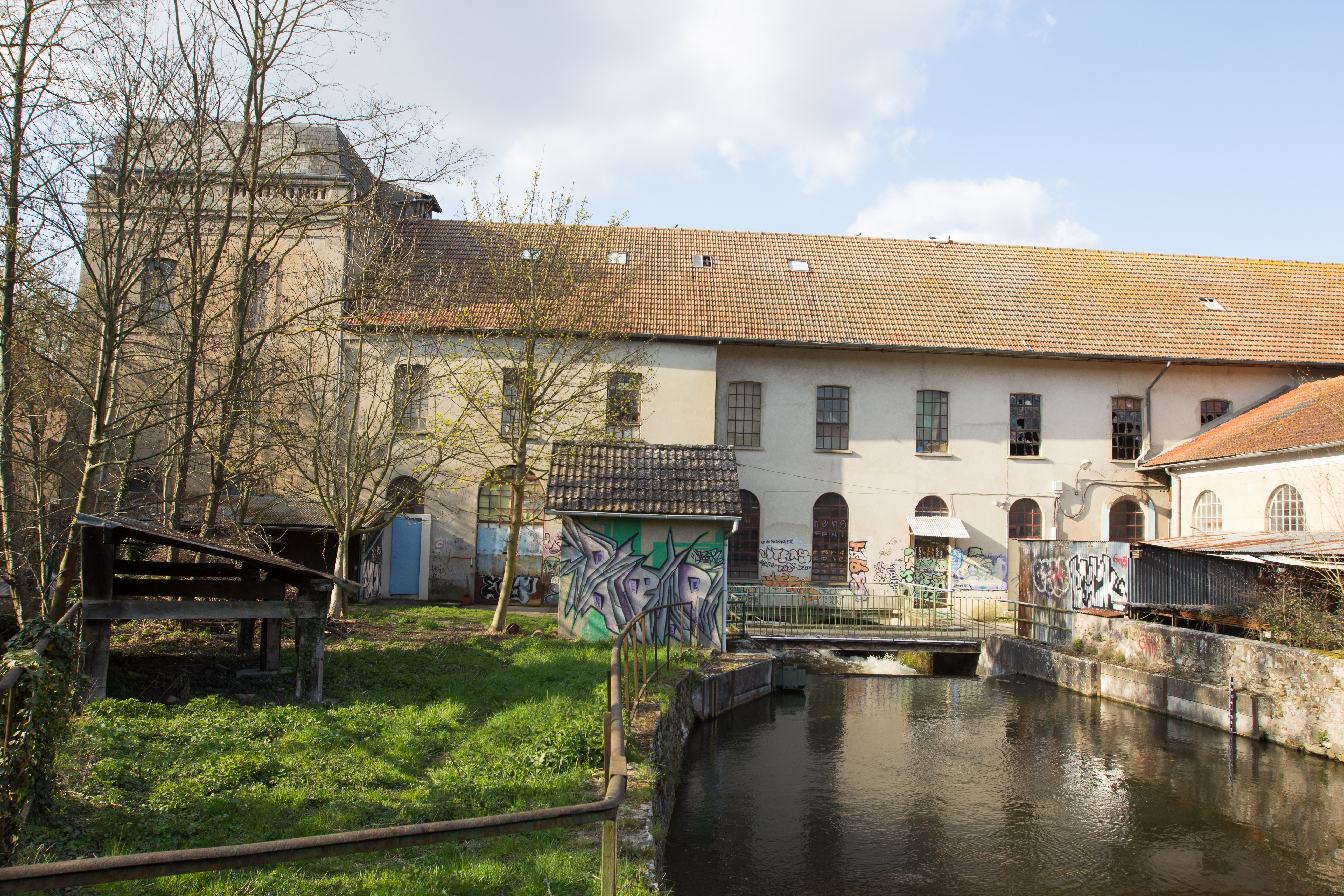 Vue de la rivière Essonne dans l'usine Darblay de Moulin-Galant à Villabé / Villabé, Essonne, France